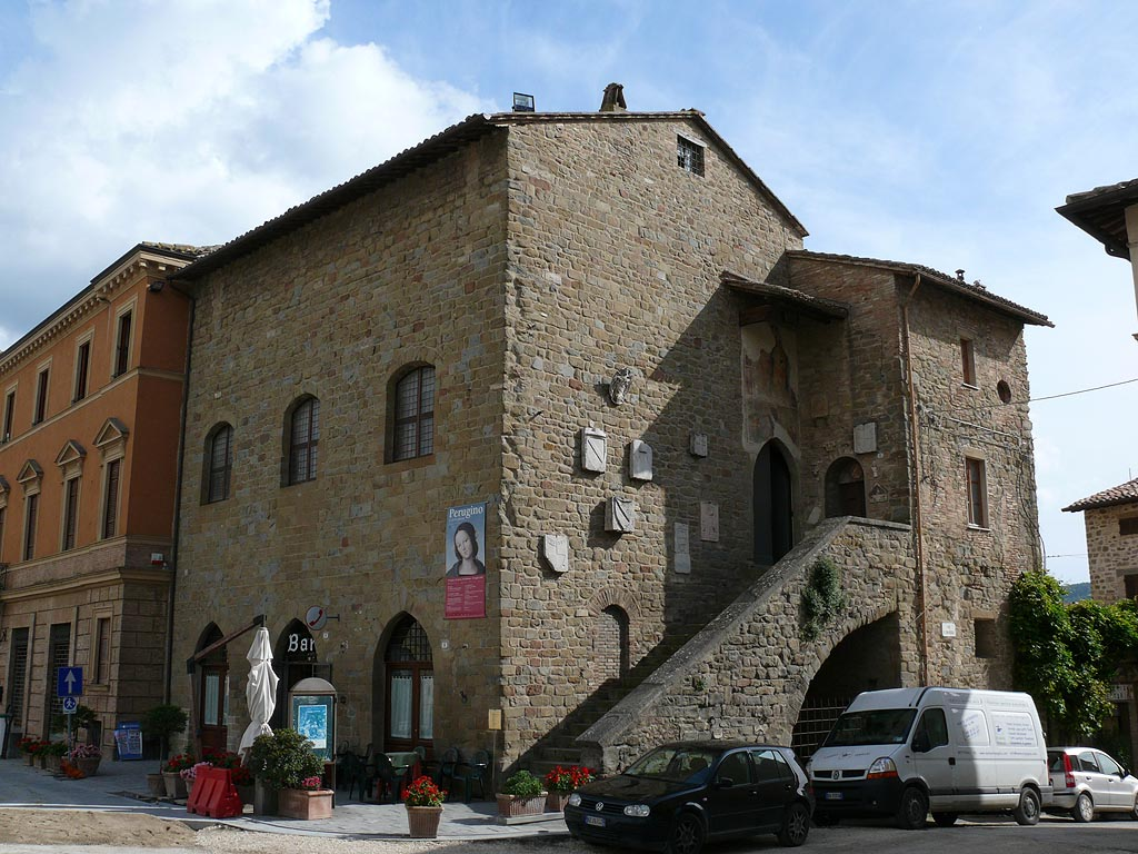 Palazzetto del Podestà with Pinacoteca